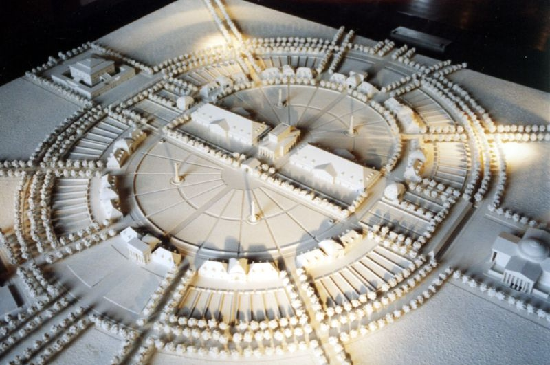 Königliche Saline in Arc-et-Senans